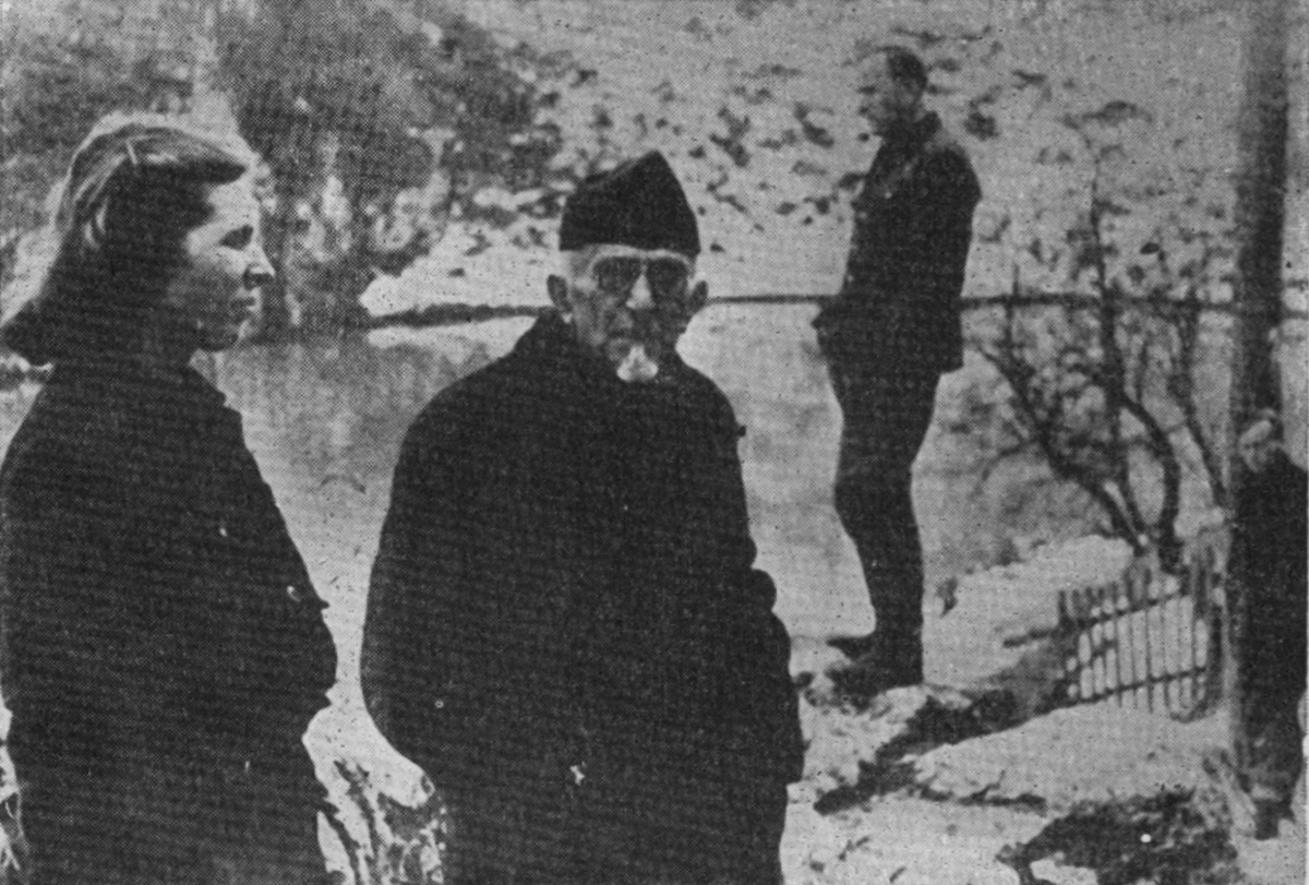 Srpskohrvatski / српскохрватски: Vladimir Nazor u partizanima